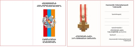 ՀՀ II աստիճանի «Մարտական խաչ» շքանշանի վկայական